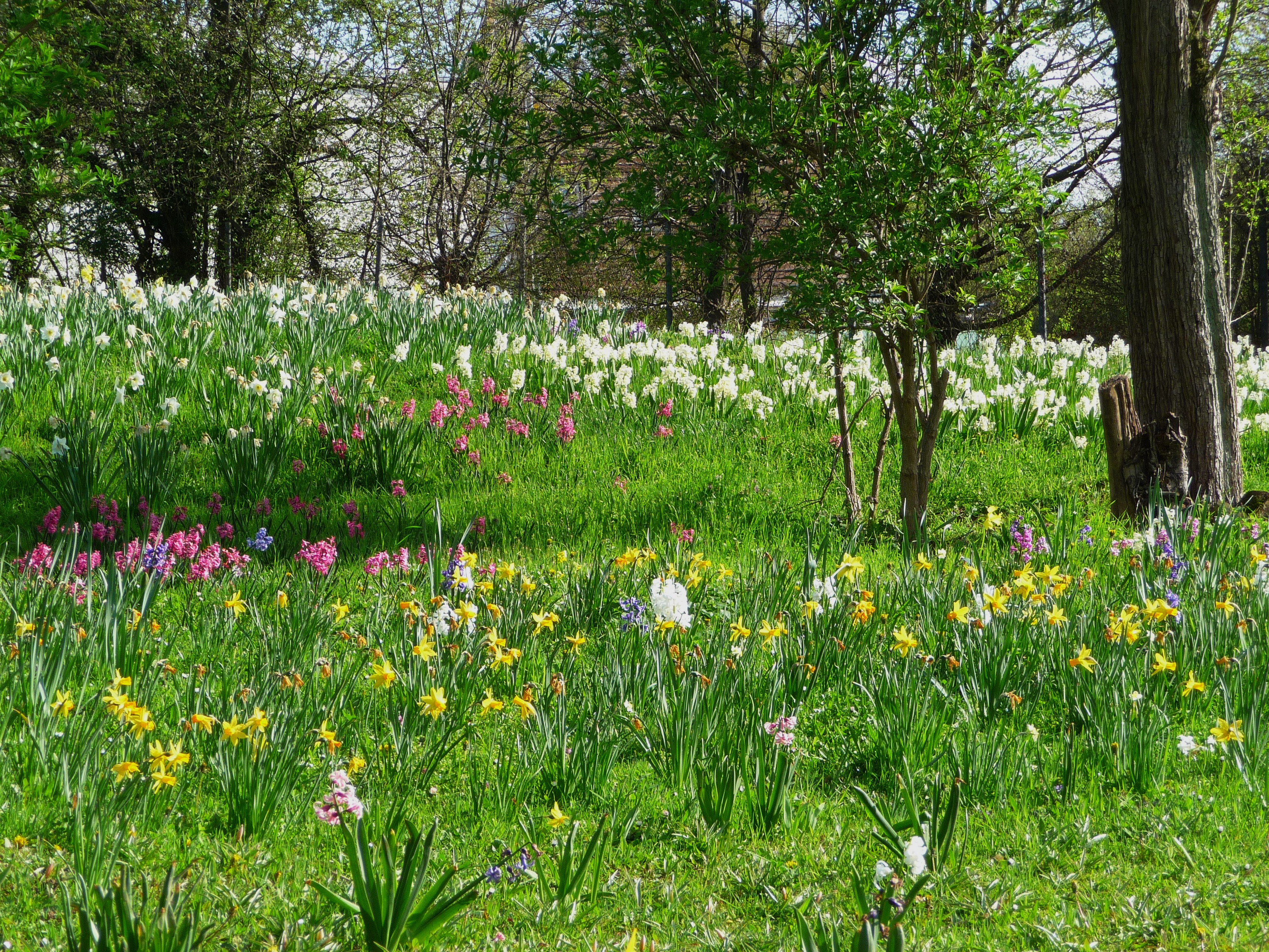 Wiese mit bunten Frühlingsblumen (Narzissen, Hyazinthen), fotografiert in Heidelberg (Baden-Württemberg, Deutschland)